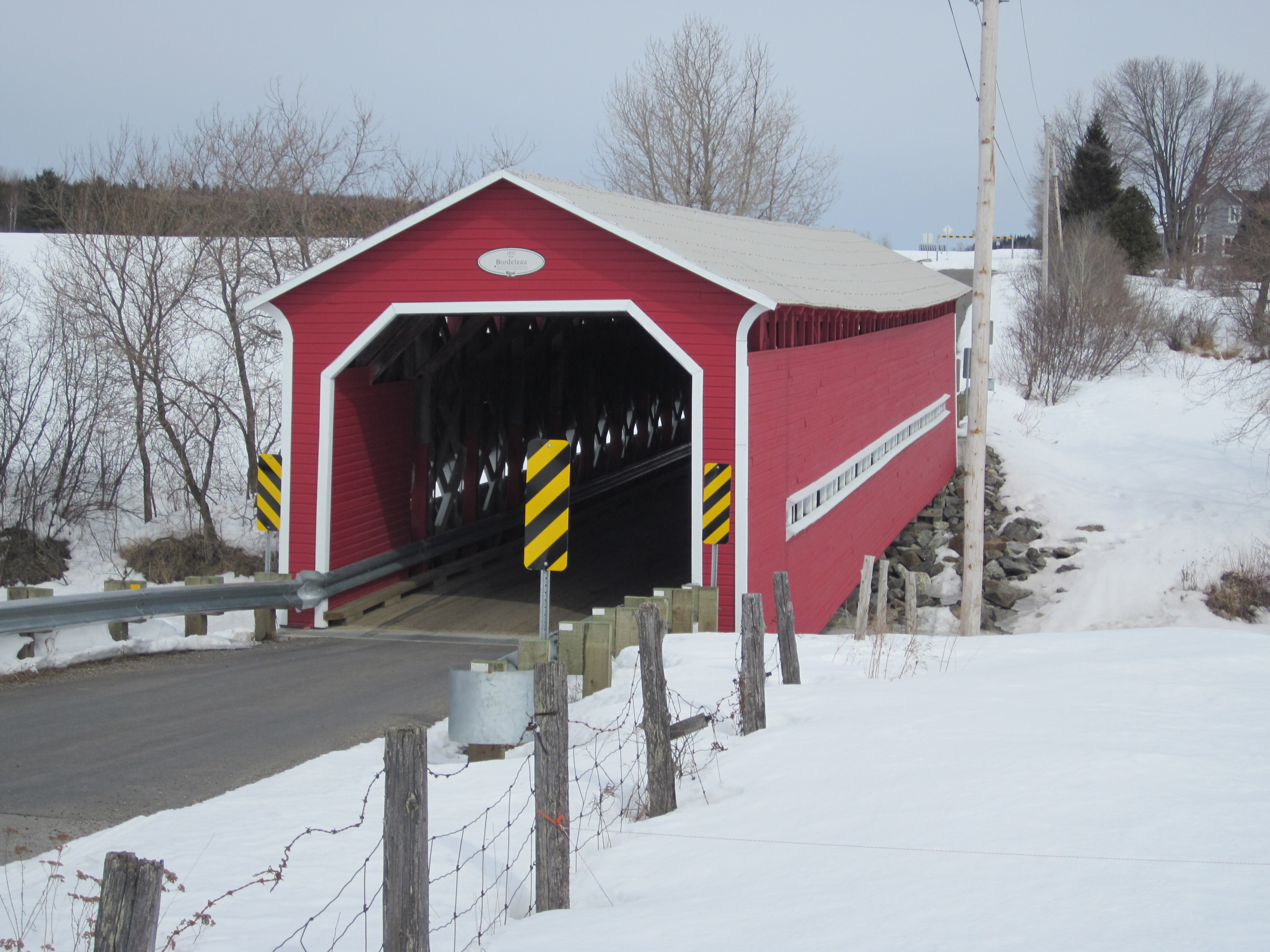 Le pont Bordeleau, situé à Saint-Séverin, vue de l'ouest.